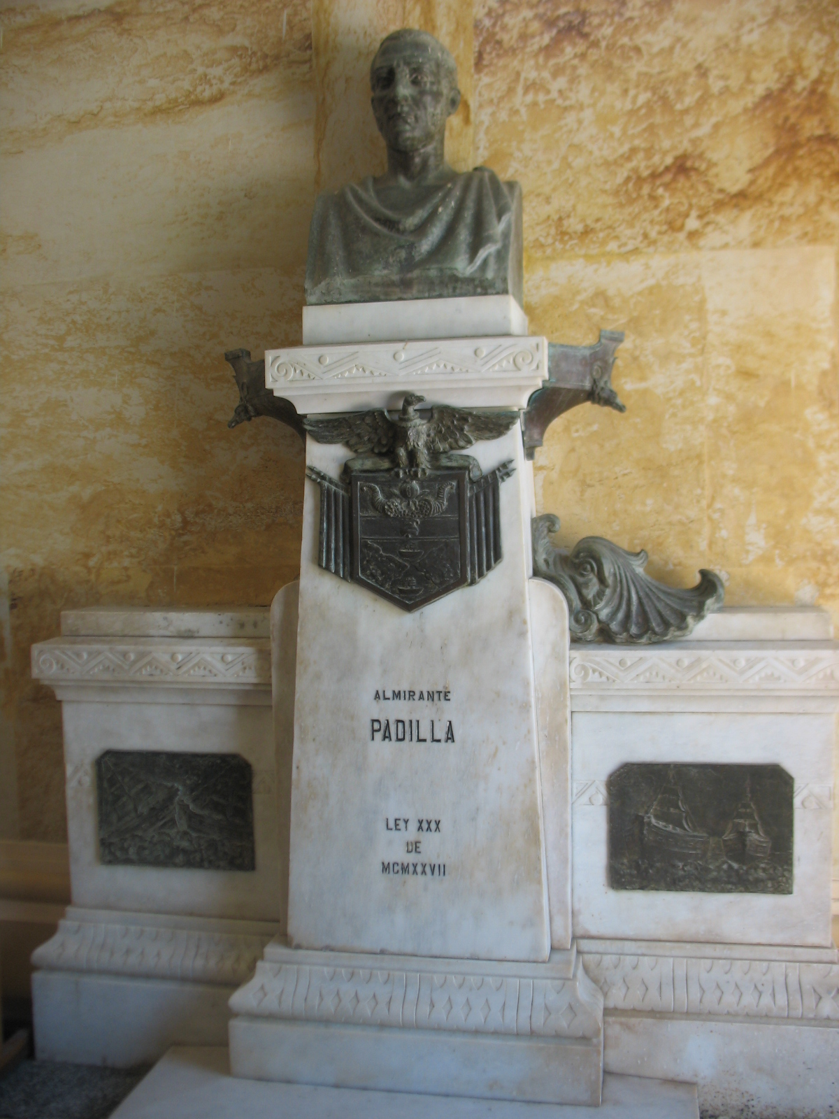 Restos del Almirante Padilla en la Catedral de Nuestra Señora de Los Remedios.